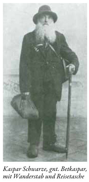 Betkaspar, eine Fotografie aus der Zeit vor 1911